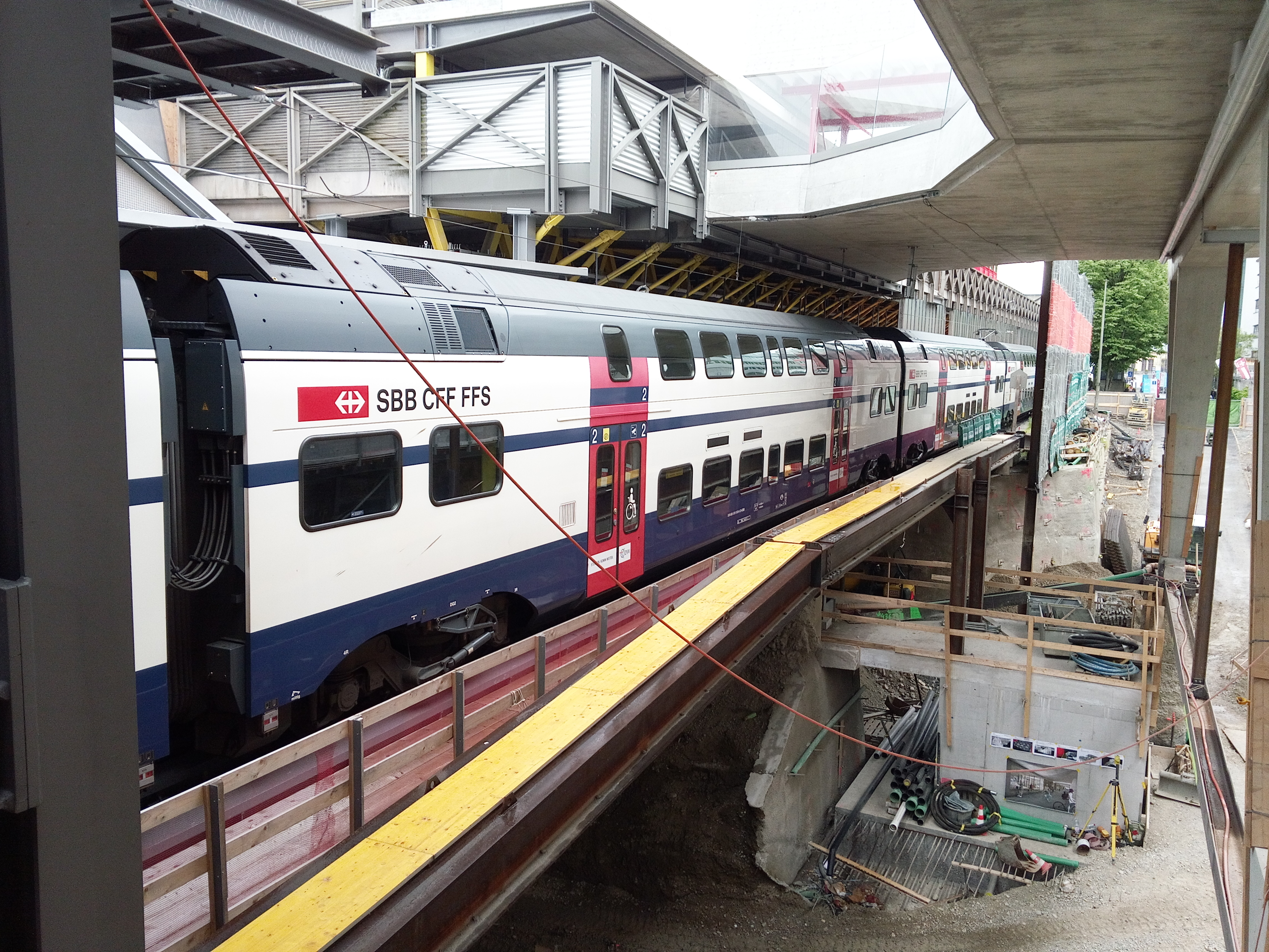 Bahnhof Winterthur. Baustelle Verbreiterung Unterführung. Die S8 auf Gleis 9.